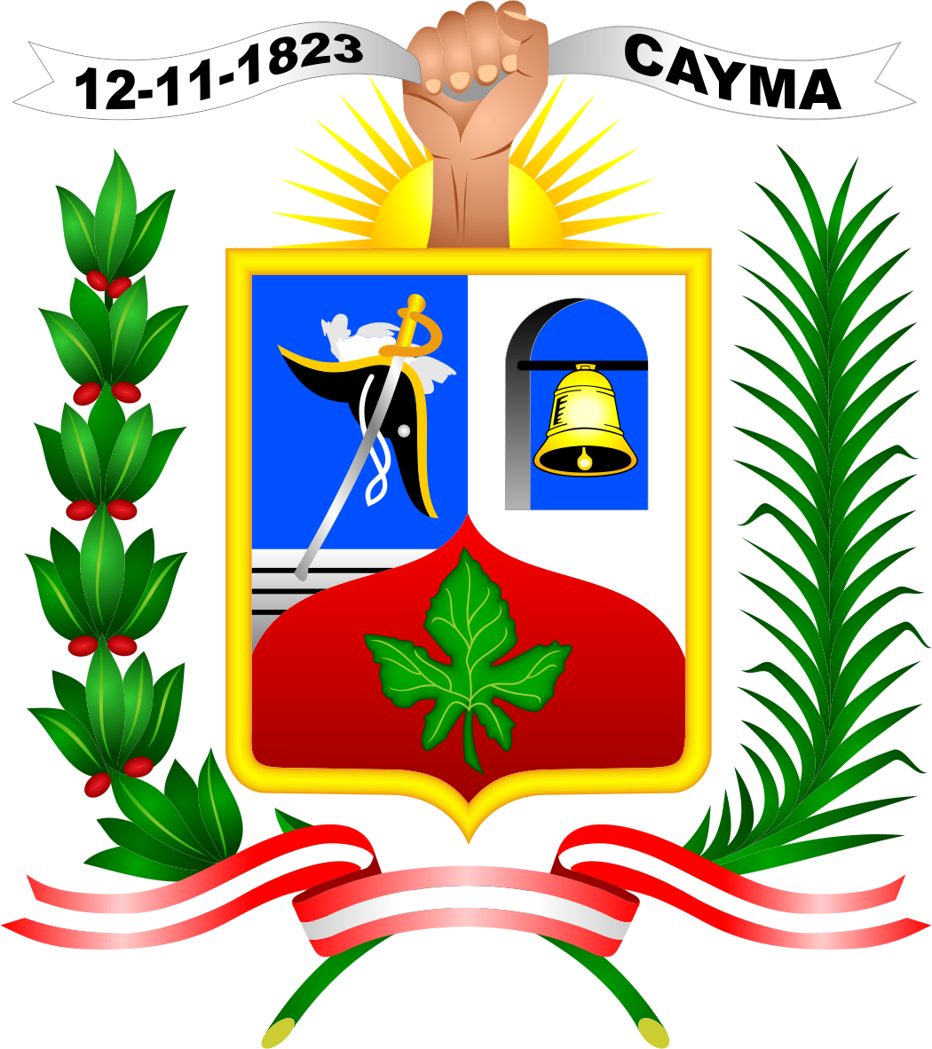 Distrito de Cayma - Provincia de Arequipa - Región Arequipa